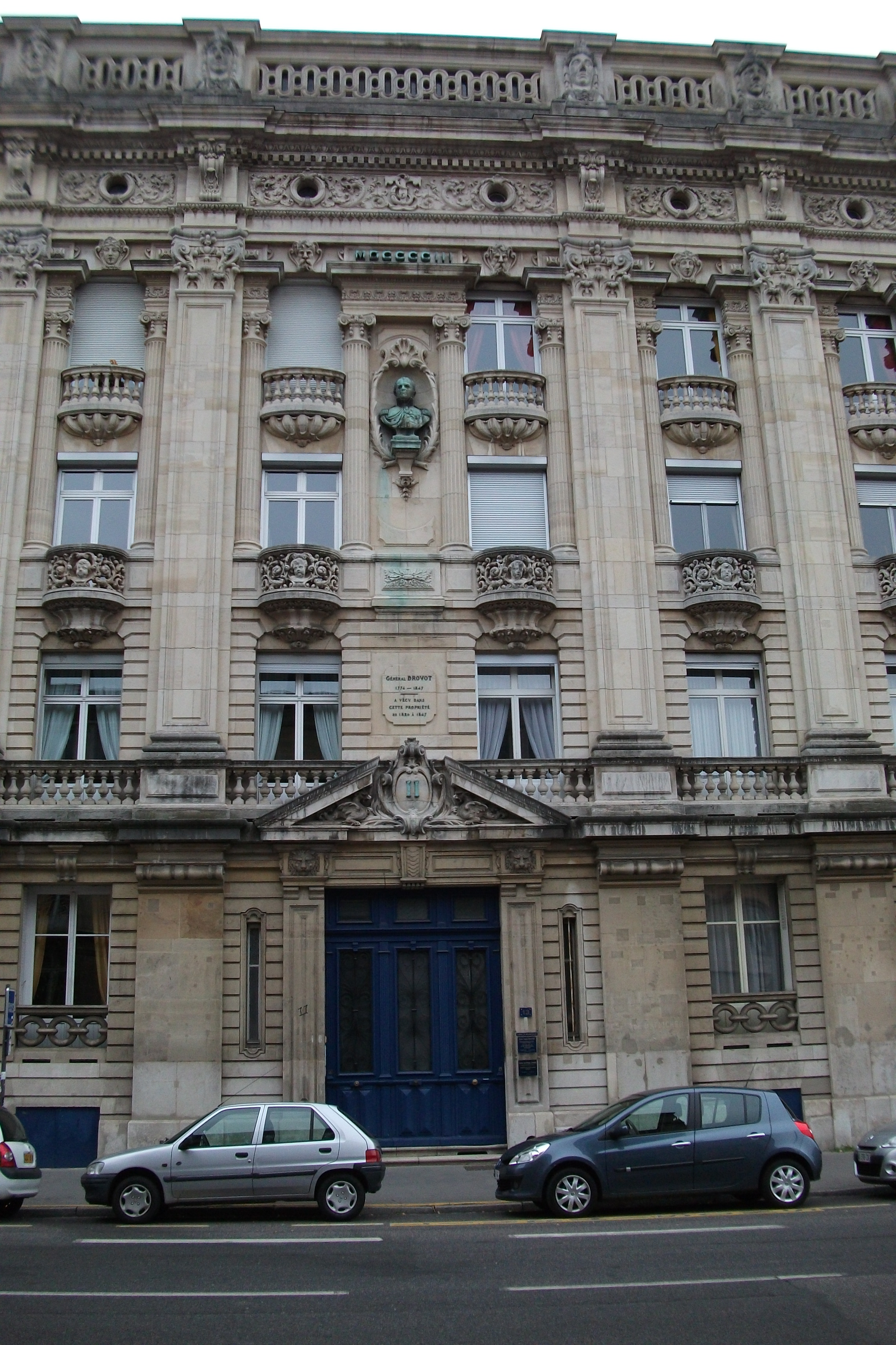 entrée de l'hôtel particulier (1803 inscript)du général Drouot entre 1820 et 1847 à Nancy. Architecte E.Thiery, sculpteur P.Wolff et entrepreneur P.Evrard.